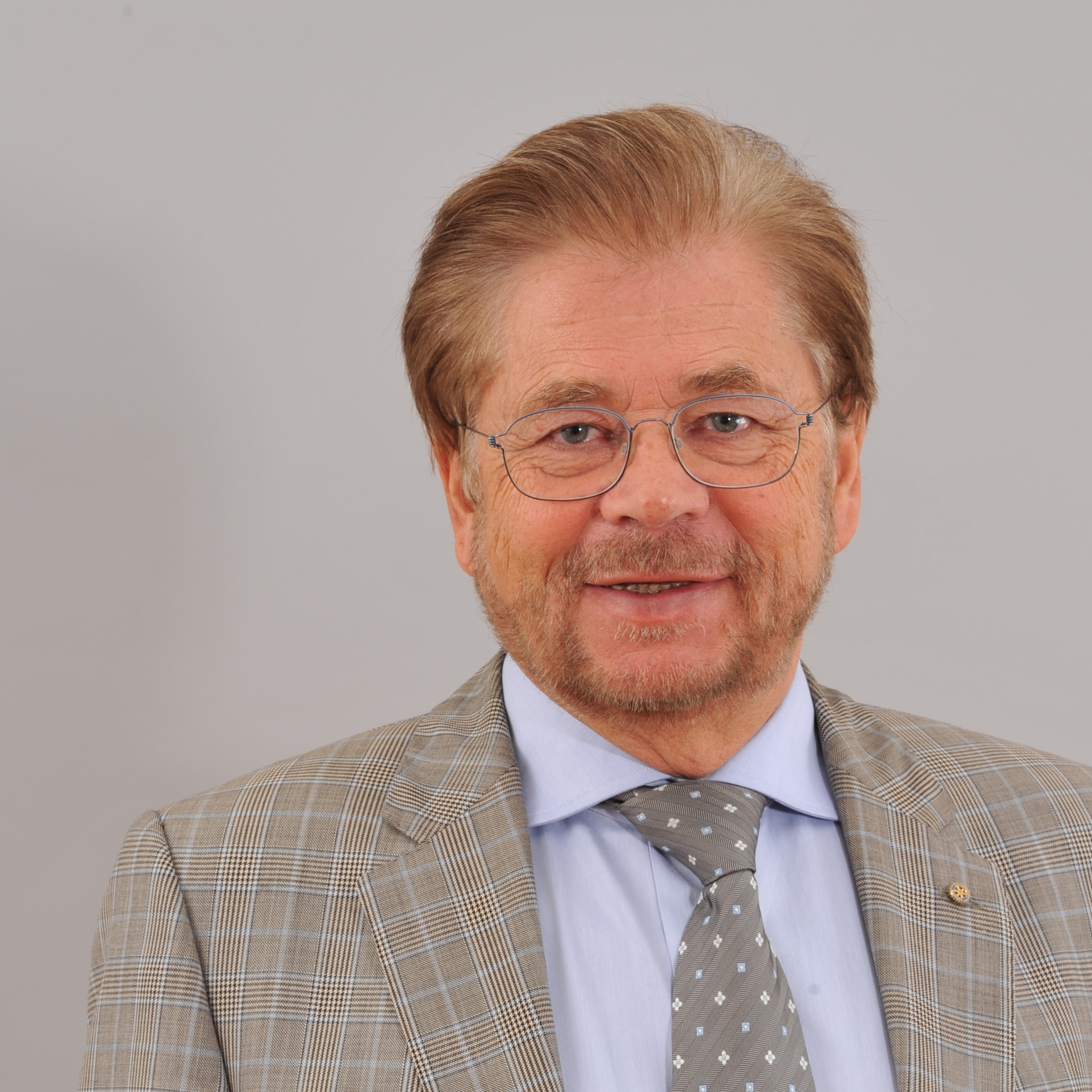 Landtagsprojekt Salzburg: Josef Sampl